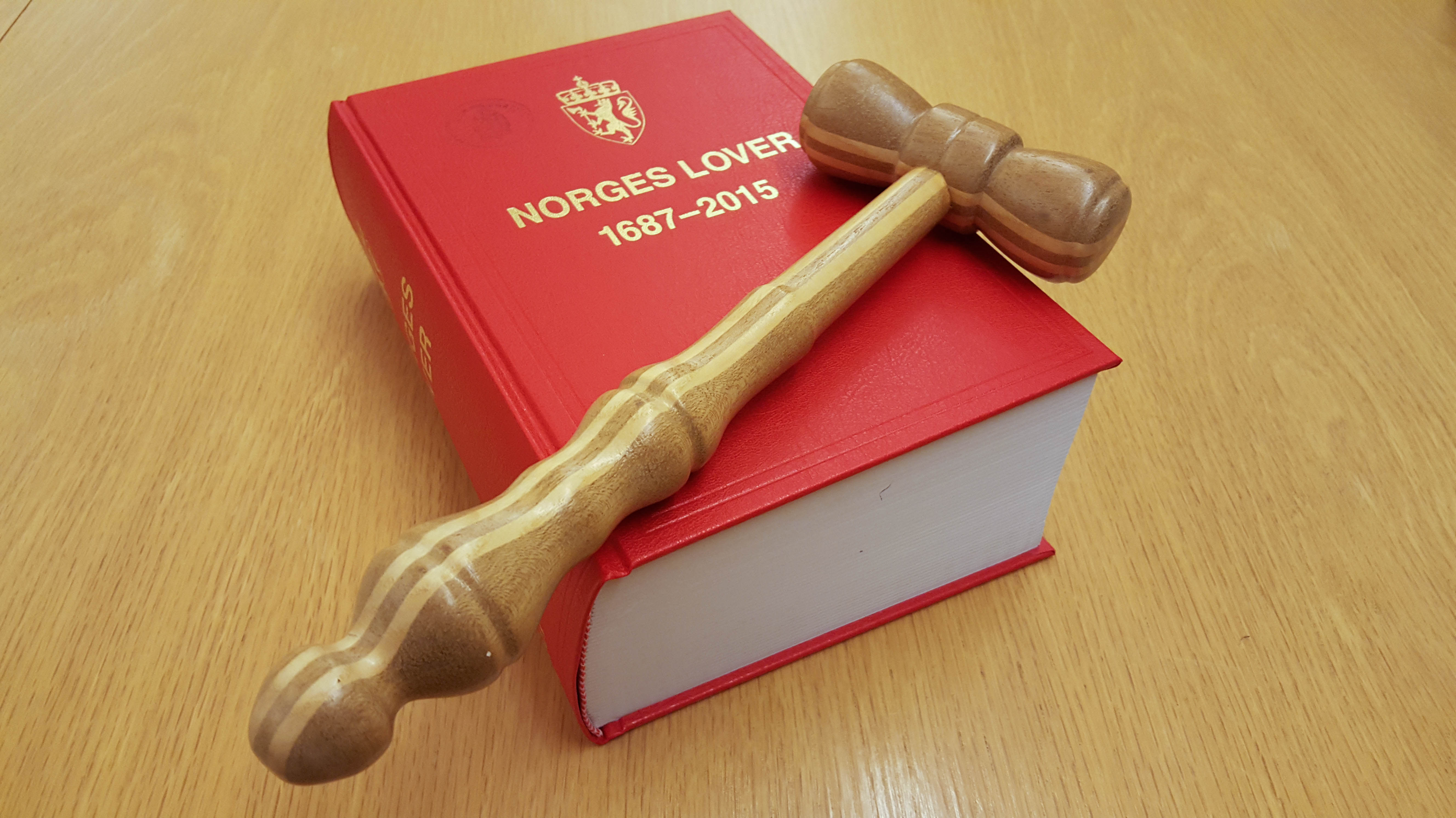 Norges lover. 2015 utgave med hammer.